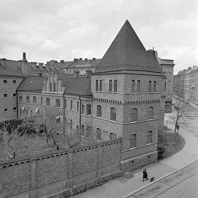 Östermalmsfängelset som revs 1968, placerad Rådmansgatan vid hörnet av Östermalmsgatan.